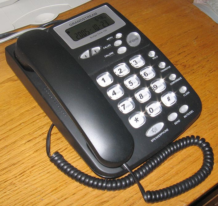 BT102-es IP-telefon